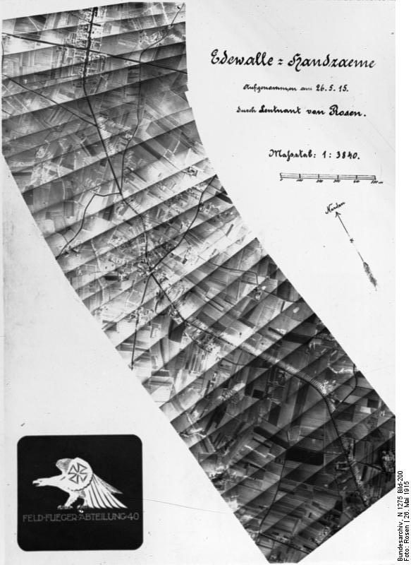 Luftbildmessung im Ersten Weltkrieg Information added by Wikimedia users.